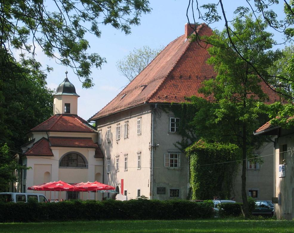 Codelli castle (Kodeljevo), Ljubljana photo:Ziga 18:03, 7 May 2006 (UTC)